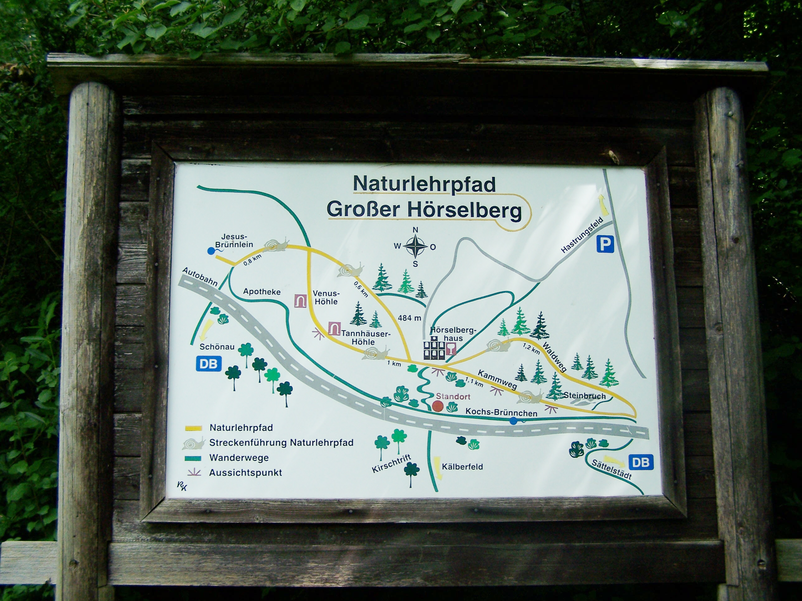 Eine Infotafel am Aufstieg zum Großen Hörselberg bei Kälberfeld.